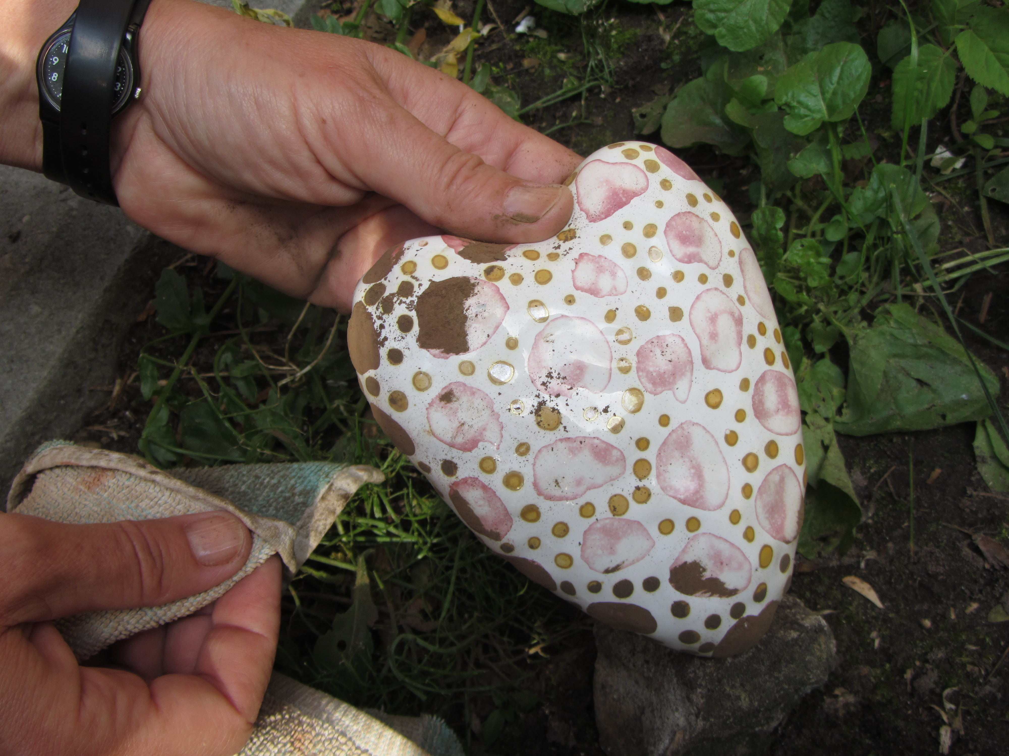 Ingrid Allik puhastab oma tööd savipastast, glasuurile jääb lüsterjas maaling.